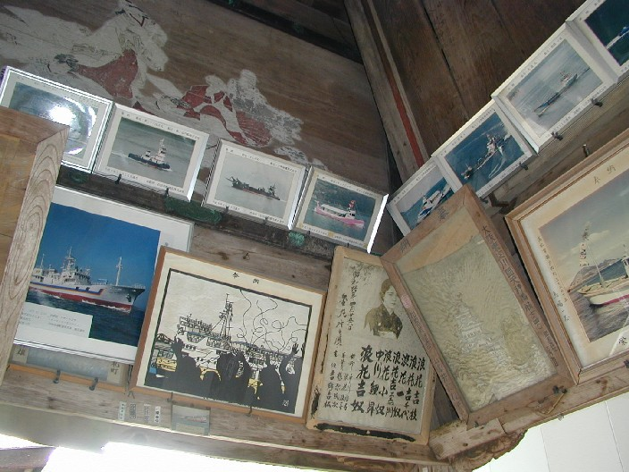 Ex voto Il tempio sommitale del monte Konpira san è dedicato ai viaggiatori. Vi sono numerosi ex voto, anche antichi, relativi a viaggi, soprattutto per mare ma anche via terra. Vi è anche una barca utilizzata per una traversata oceanica che costituisce un ex voto piuttosto singolare. La foto è stata scattata da me l'11 agosto 2002 nei pressi di Kotohira (isola dello Shikoku, Giappone).